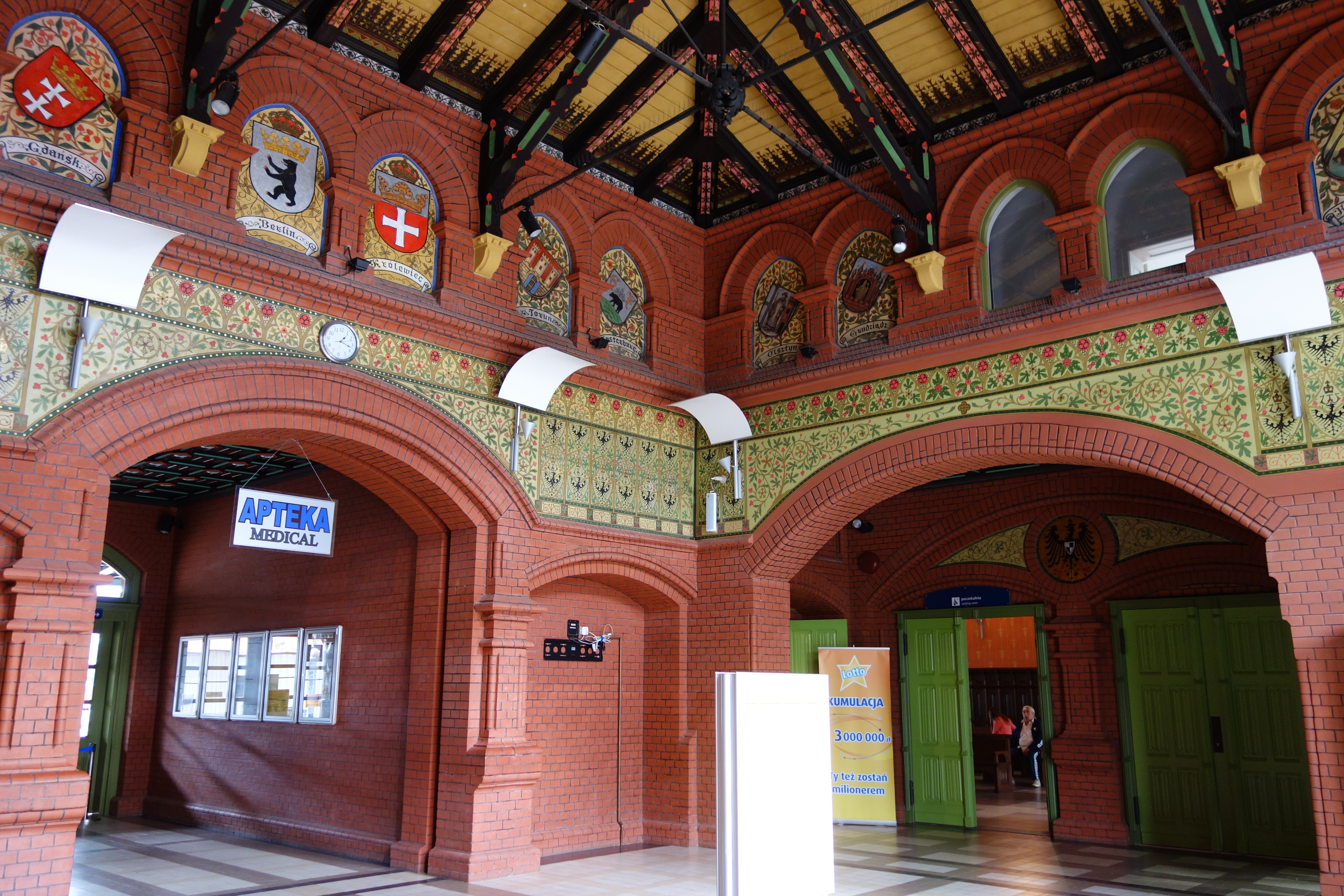 Malbork - dworzec kolejowy , You can see all photographs in category Wikiekspedycja kolejowa 2014.